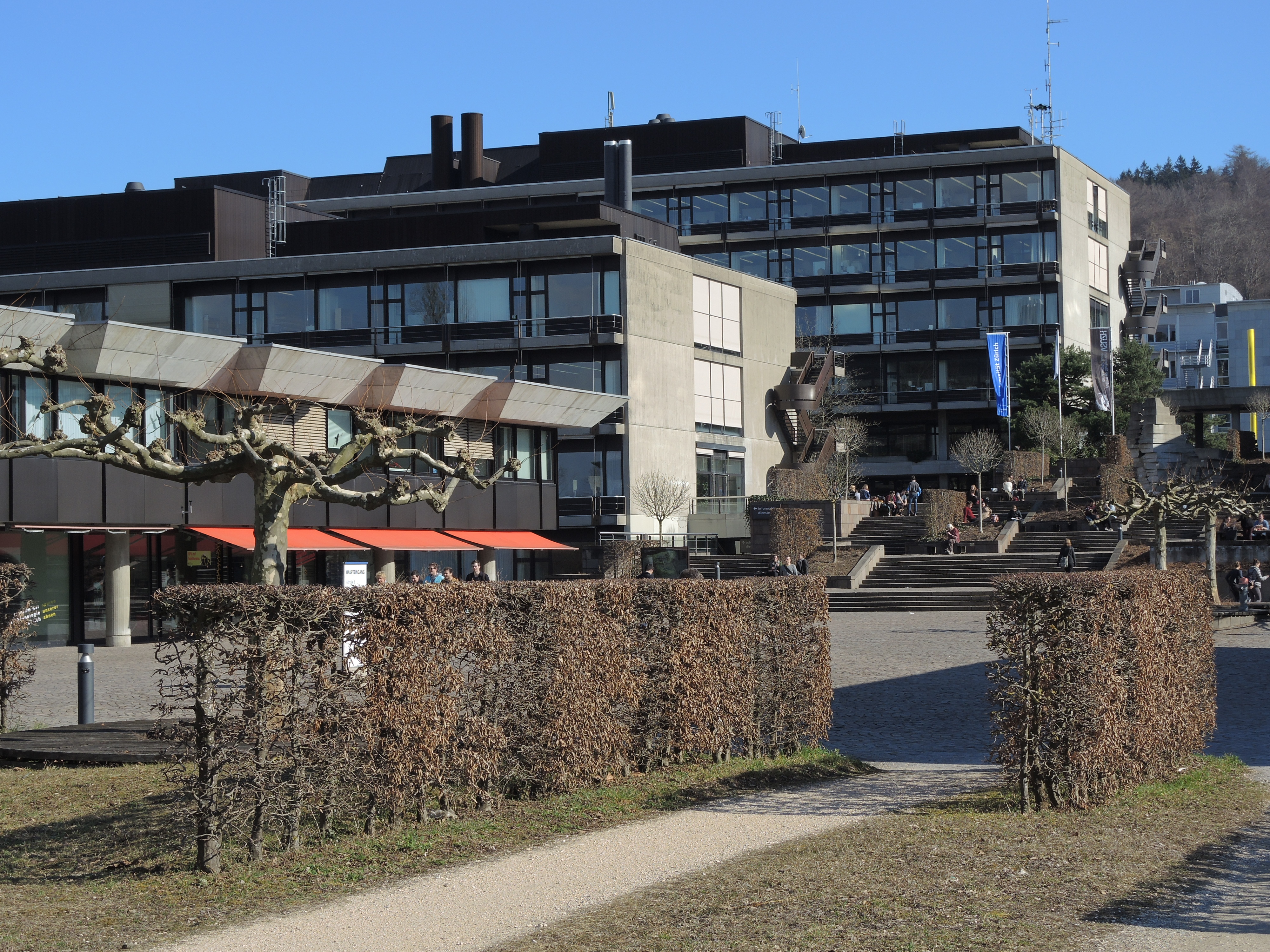 Campus Irchelpark in Zürich (Switzerland)